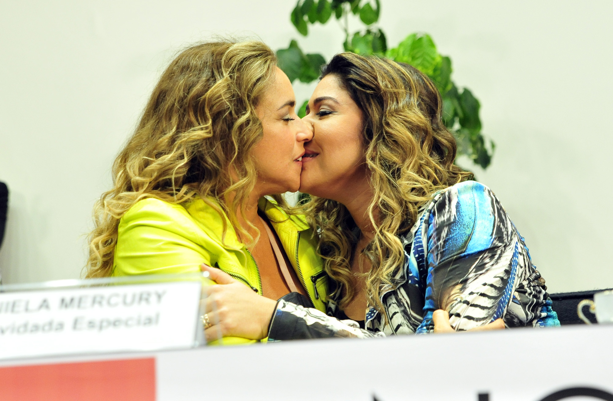 Convidada para participar do XII Seminário LGBT na Câmara dos Deputados, a cantora Daniela Mercury beijou na boca a mulher, a jornalista Malu Verçosa.